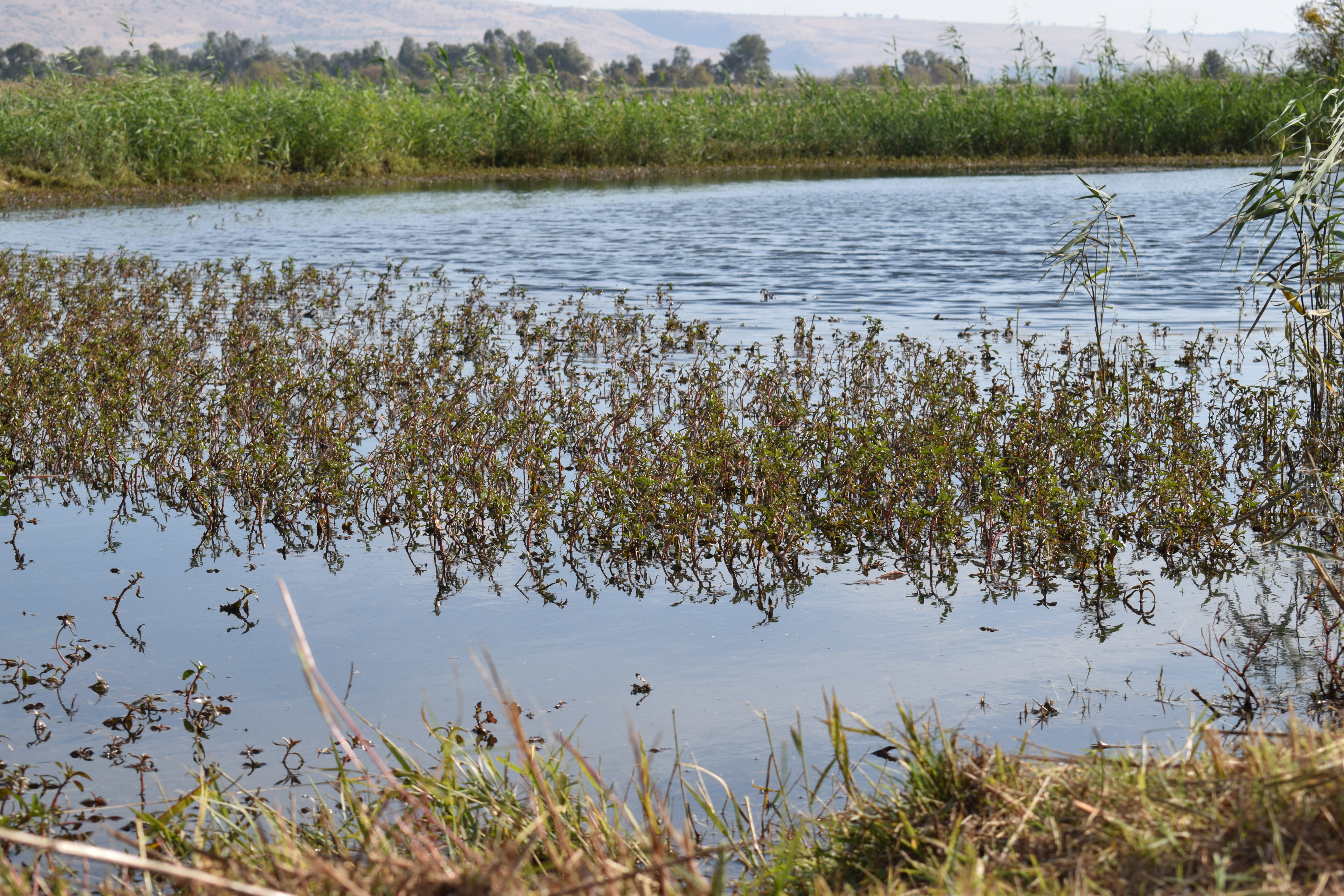 ביצה באגמון החולה